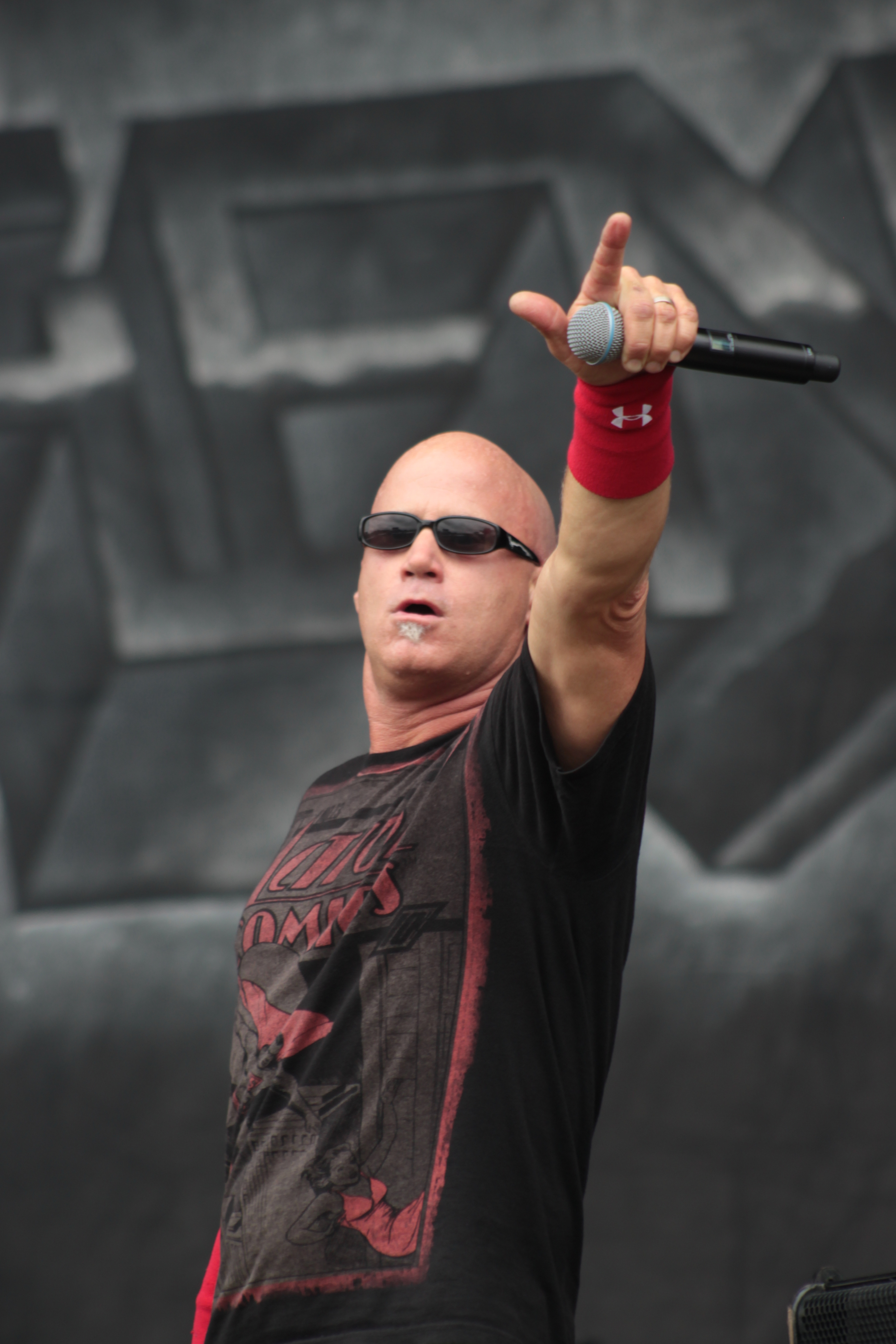 David Godfrey White, Heathen, Helfest 2013, Fr-44-Clisson.